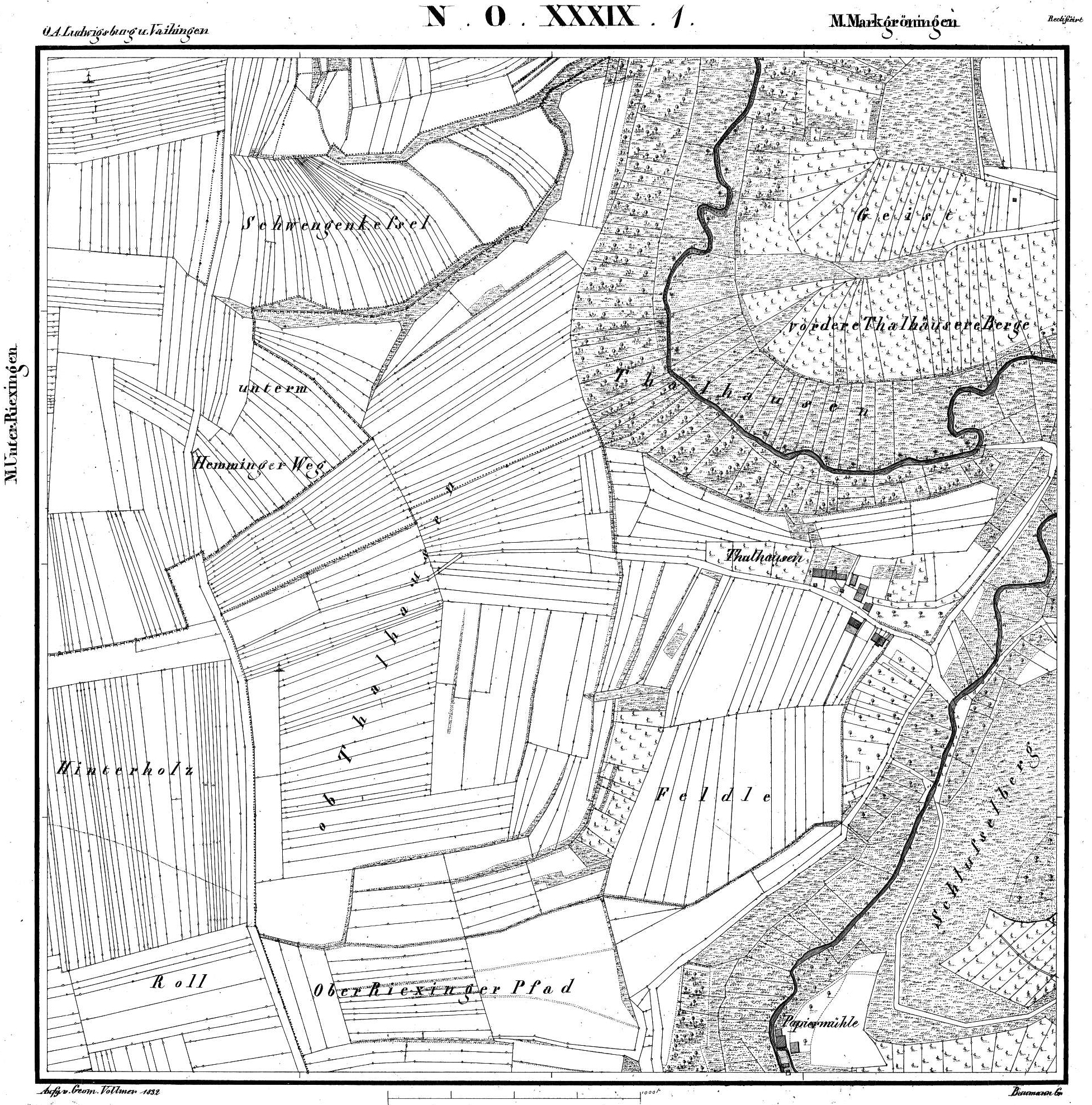 Talhausen bei Markgröningen auf der württ. Urflurkarte von 1832, Blatt NO XXXIX,1, Maßstab 1:2500